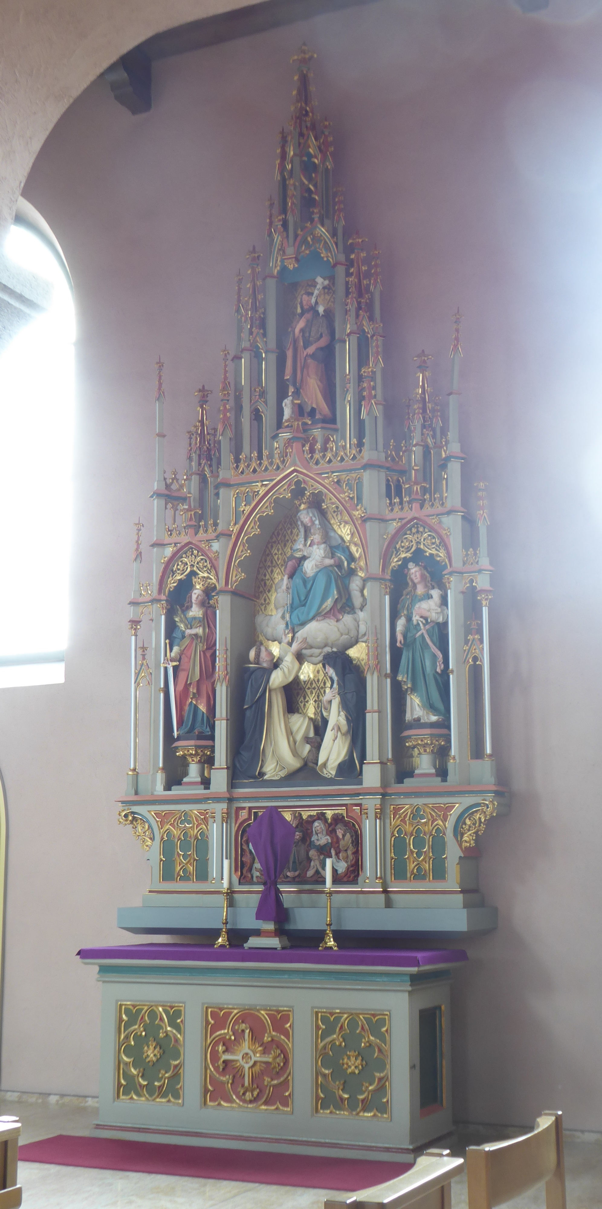 Pfarrkirche Eschen FL: Seitenaltar rechts